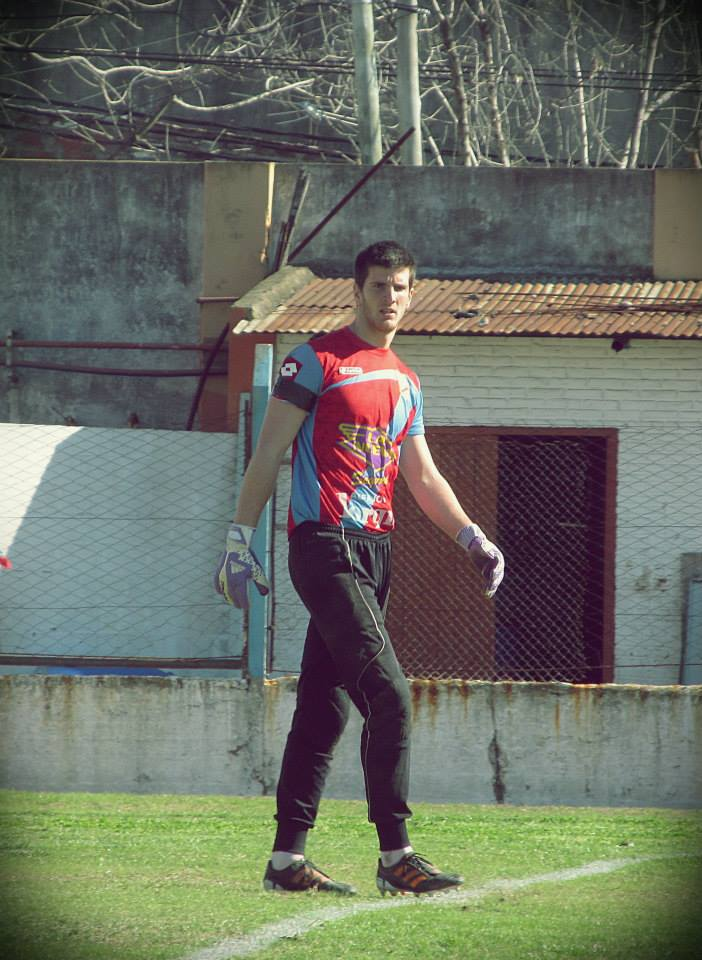 Arquero